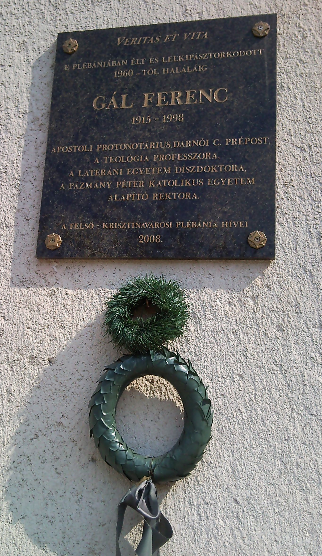 Gál Ferenc prépost emléktáblája. Budapest, XII. kerület Apor Vilmos tér 9